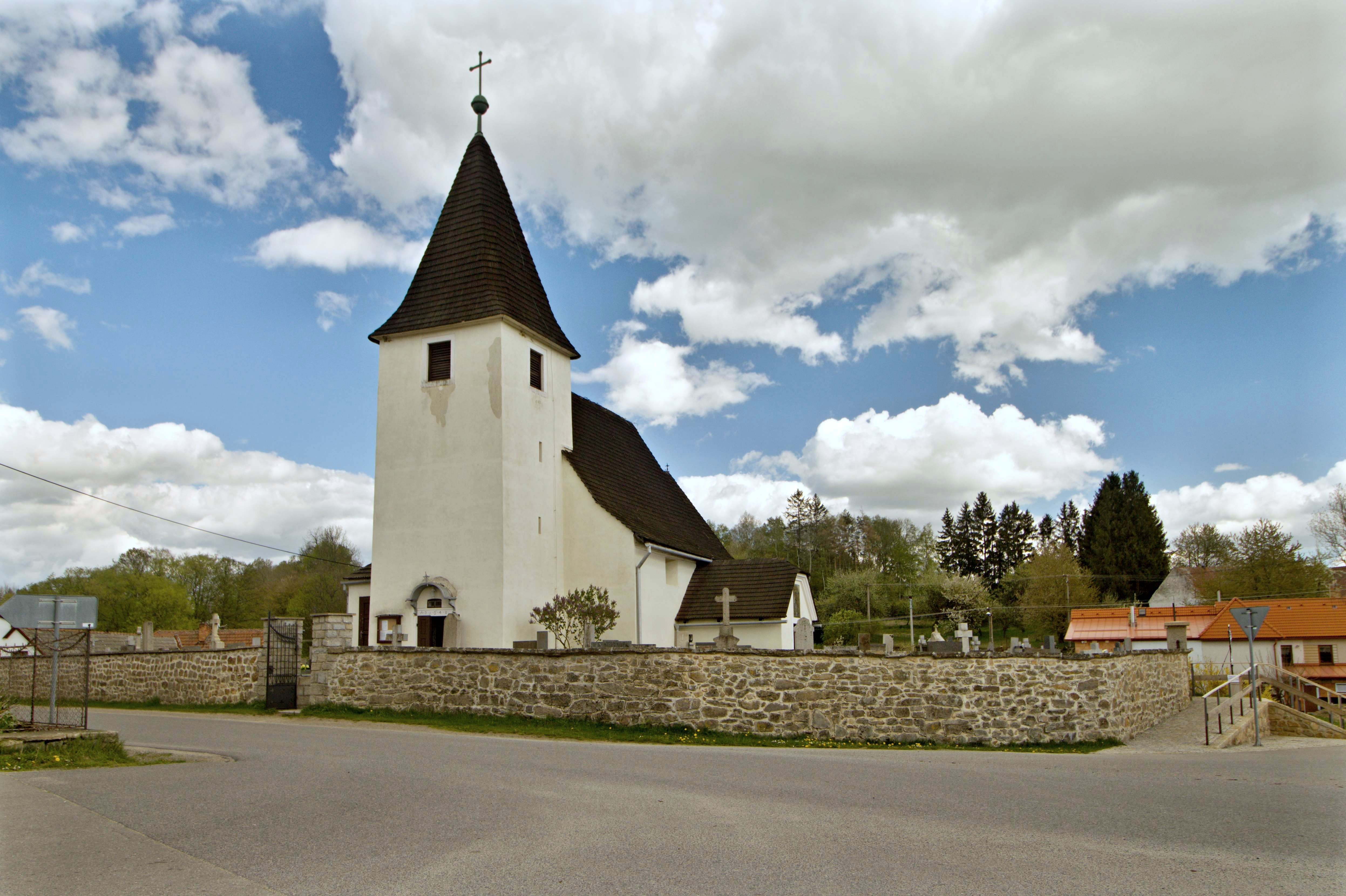 Kostel sv. Maří Magdaleny v Růžené